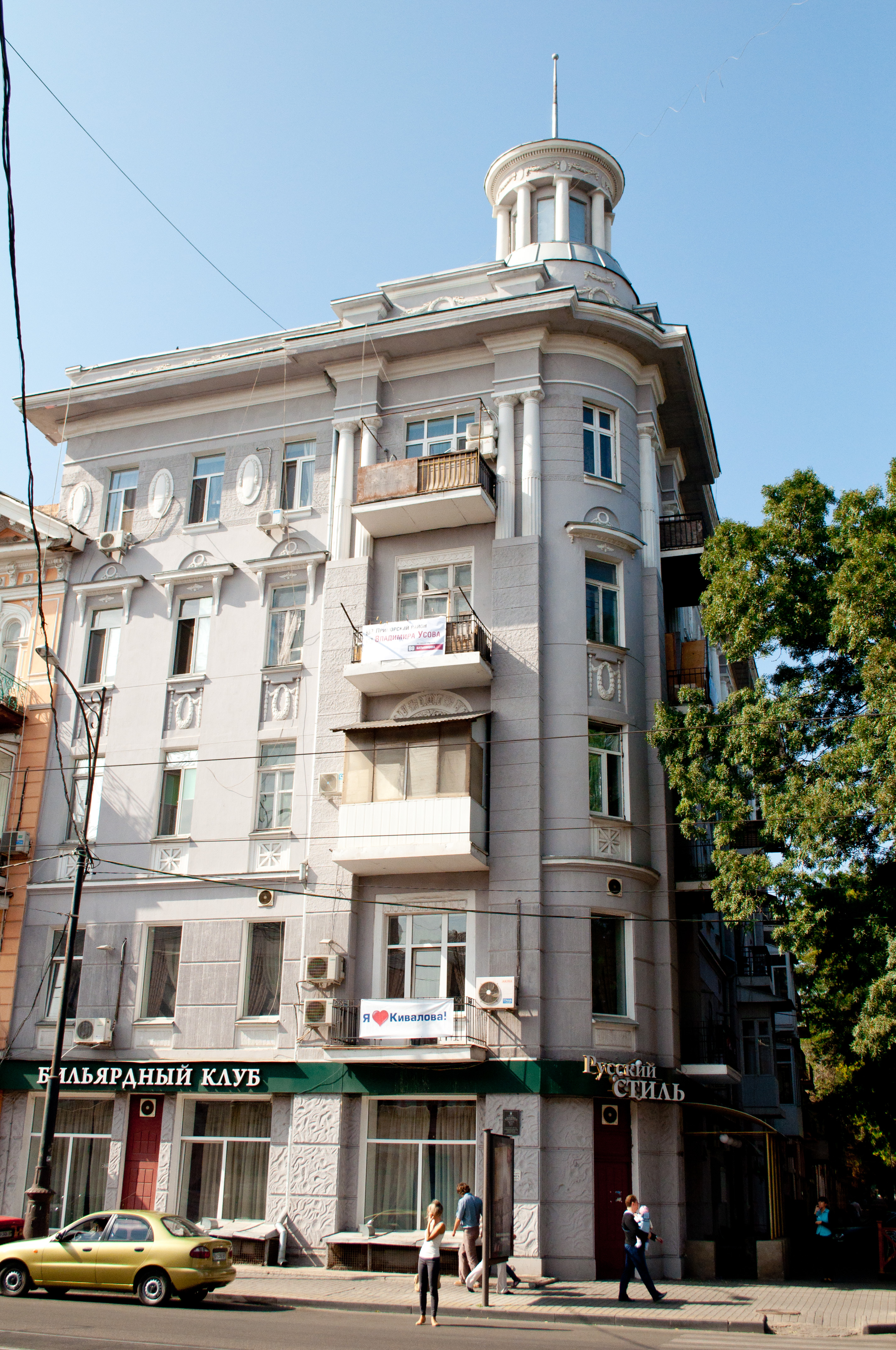 Будинок Рудь, в якому жив М.А. Аганін - геофізик, чл.-кор. АН УРСР, один з засновників Одеського політехнічного інституту